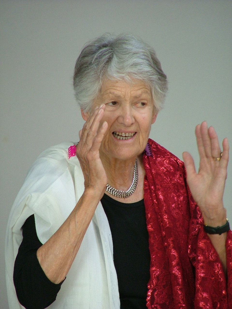 Heidi Frei, Mitbegründerin der Jeux Dramatiques